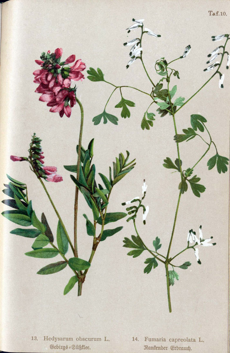 Illustration of Fumaria capreolata